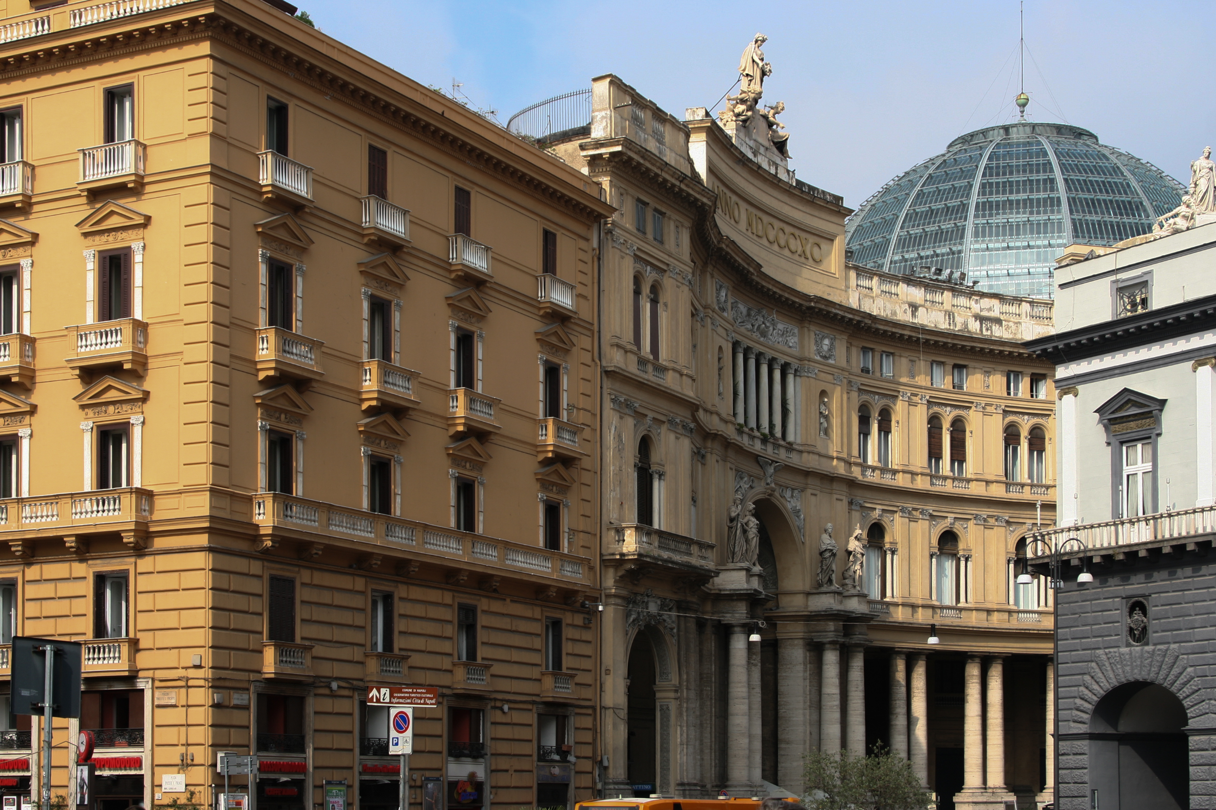 ...in Neapel .... Italien